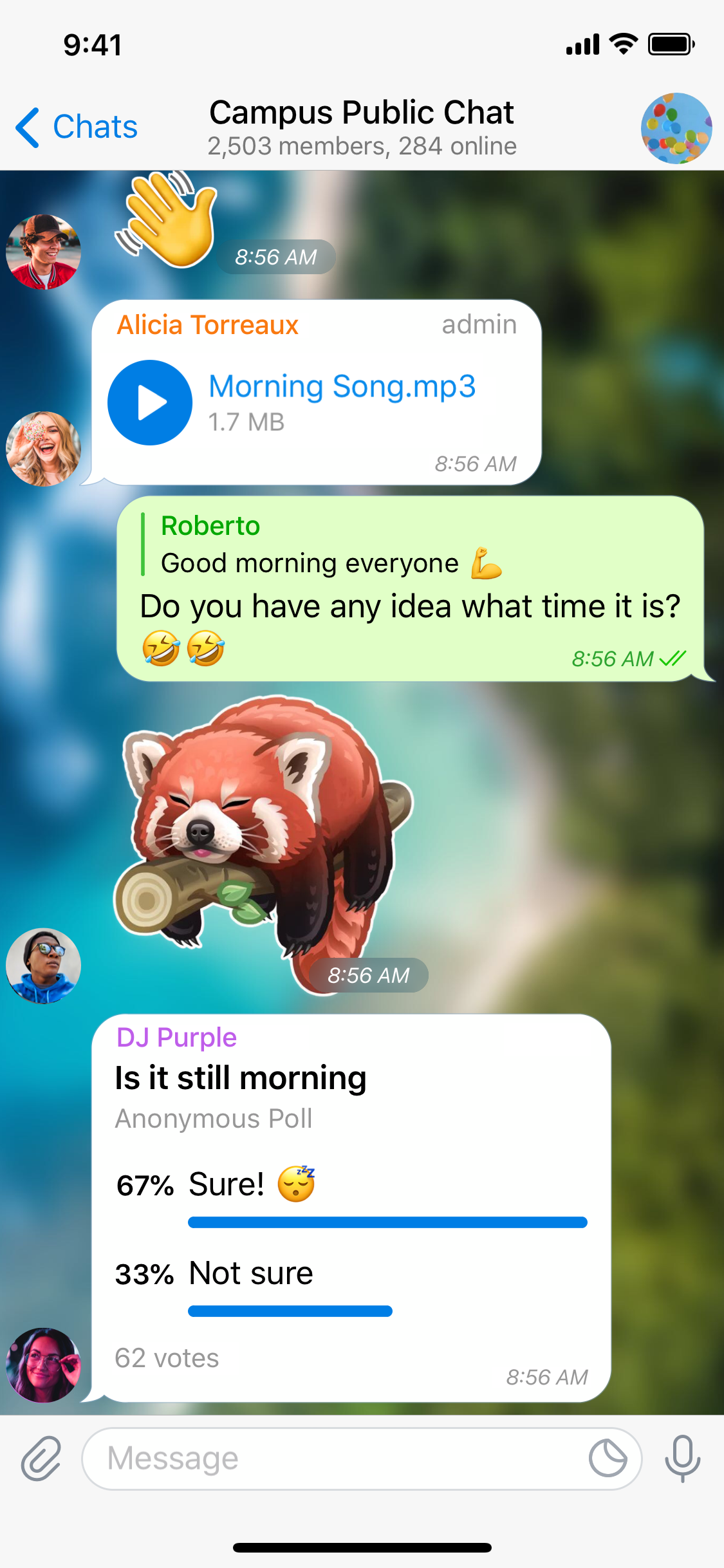 В группах и каналах в Telegram можно создавать анонимные опросы.